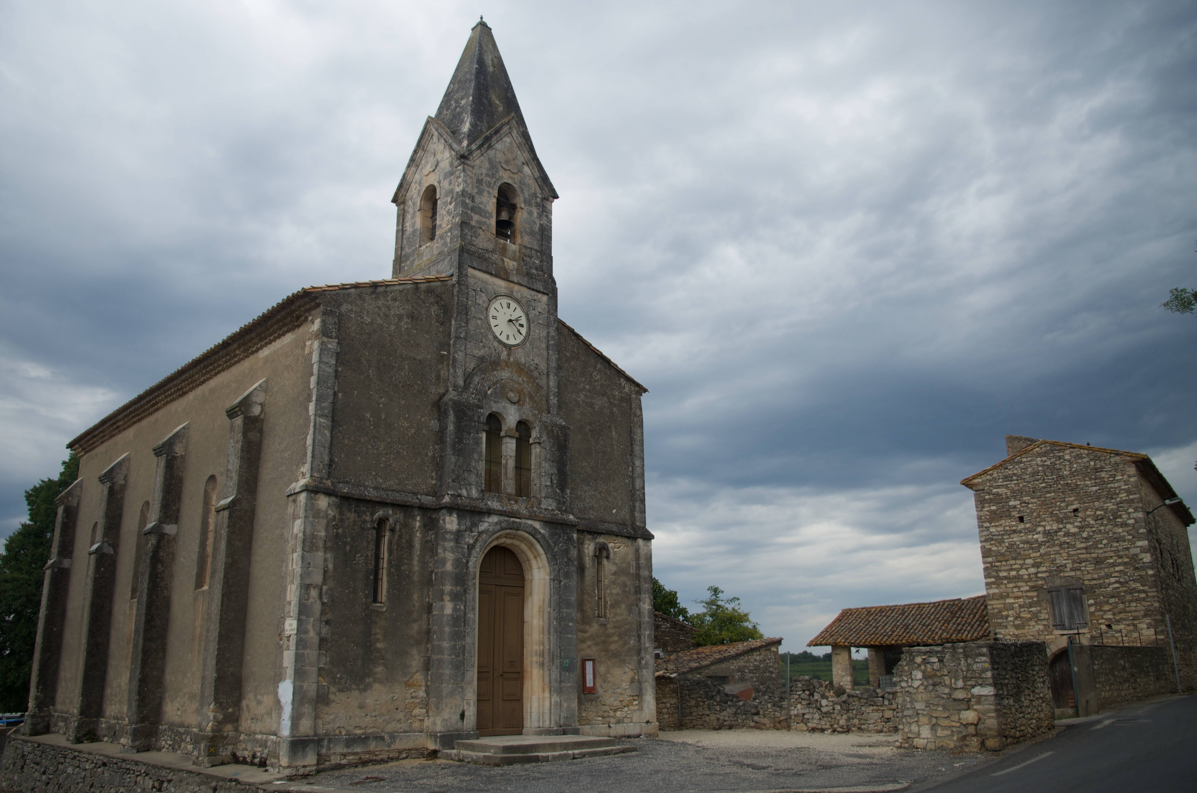 Façade du temple protestant